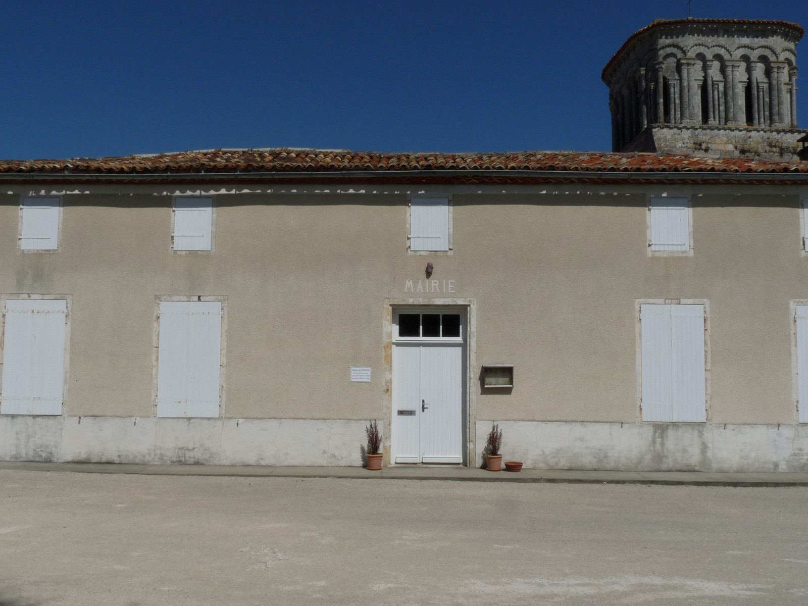 Mairie de Moings, Charente-Maritime, France